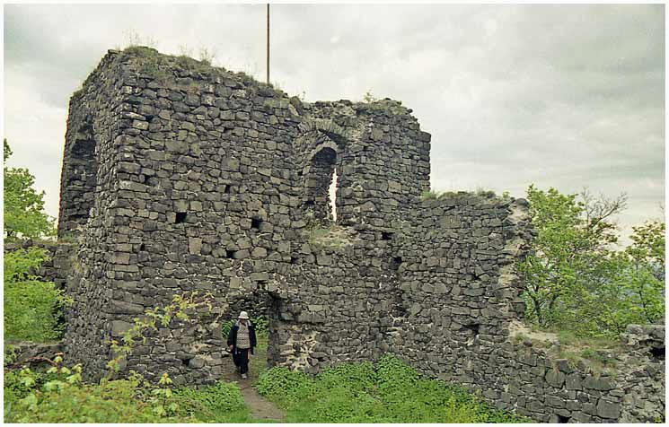 Fotografie zříceniny obytné věže hradu Ronov u České Lípy.